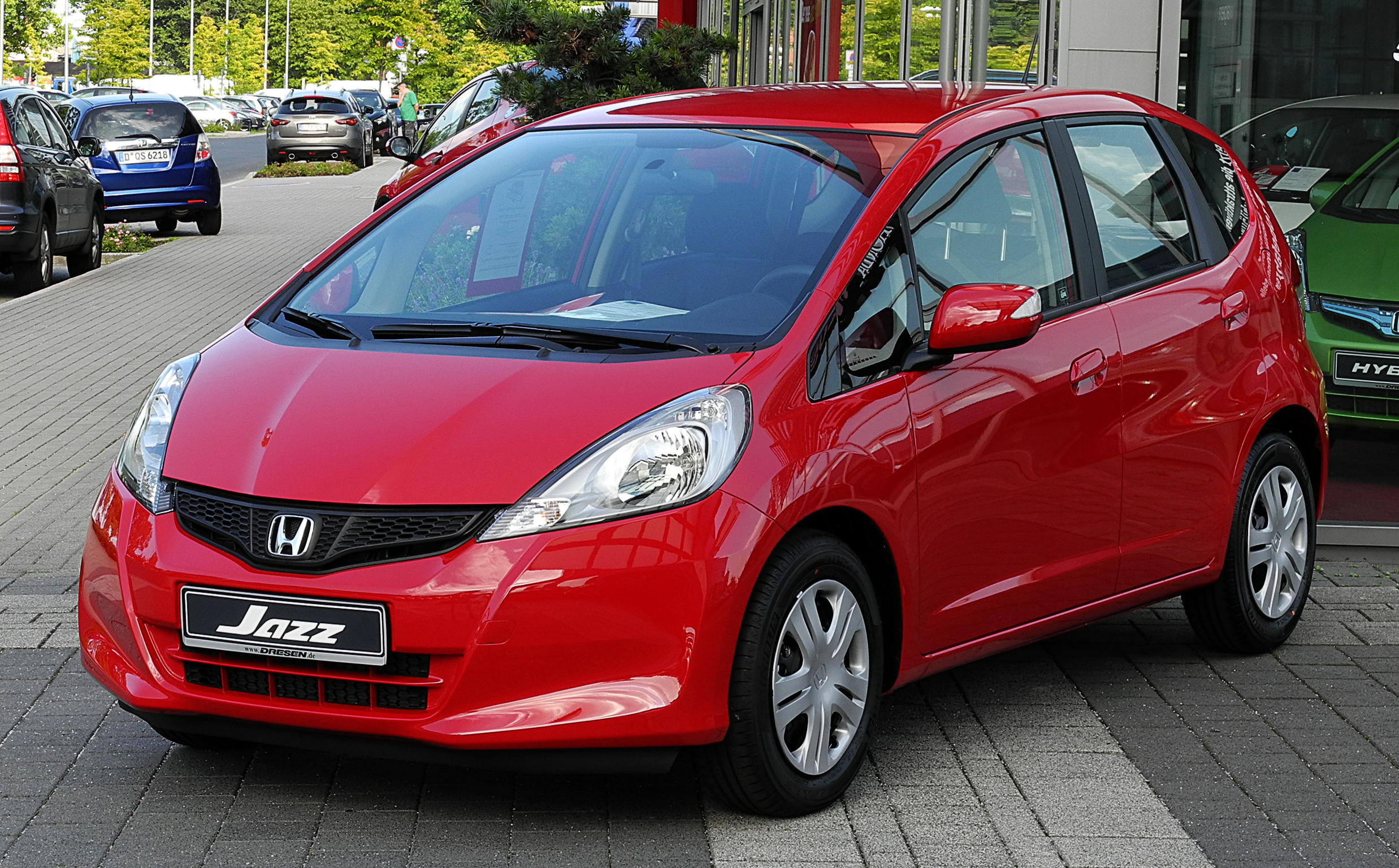 Honda Jazz 1.4 i-VTEC Trend (III, Facelift)